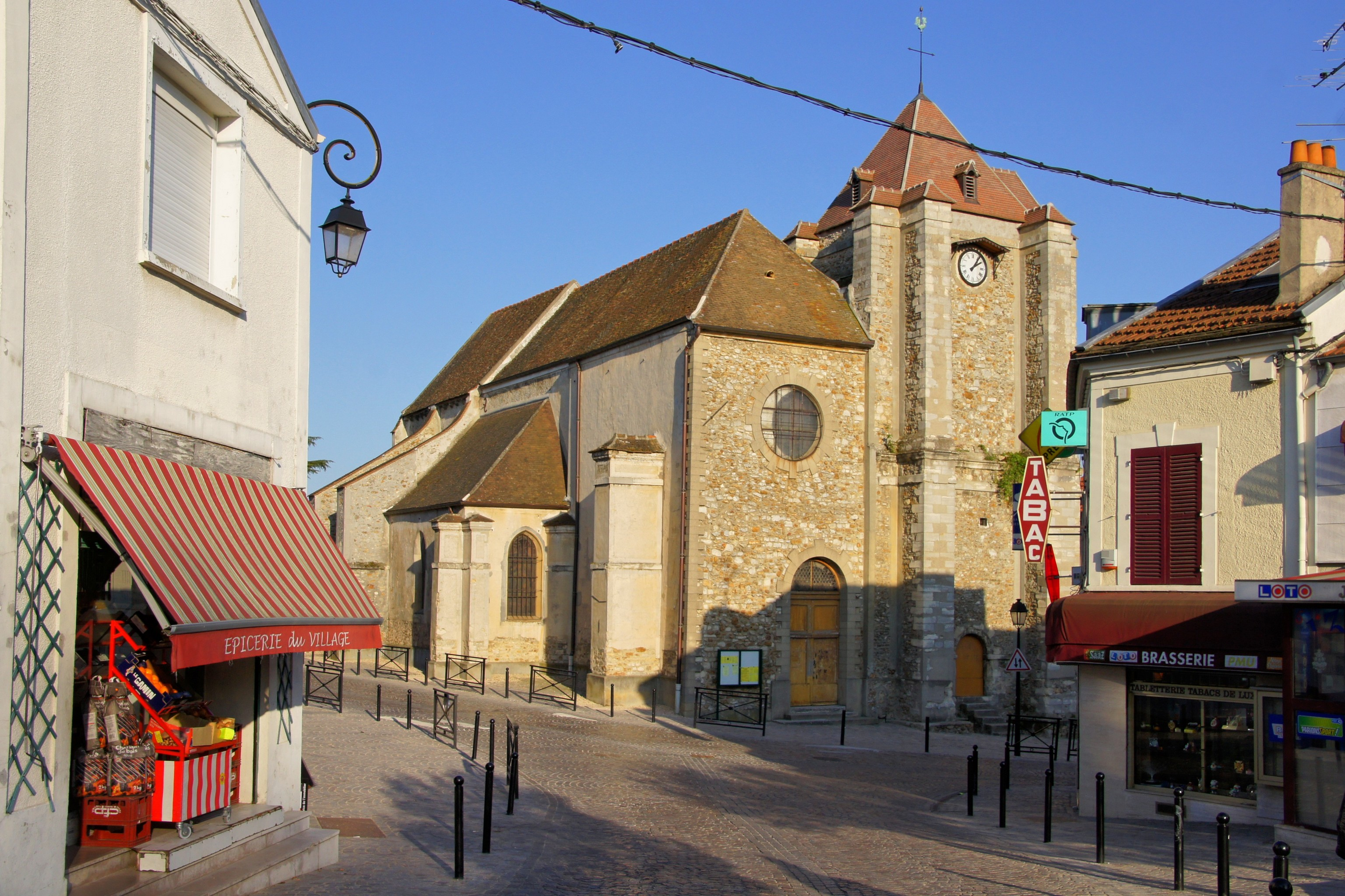 L'église de La Queue en Brie (94)